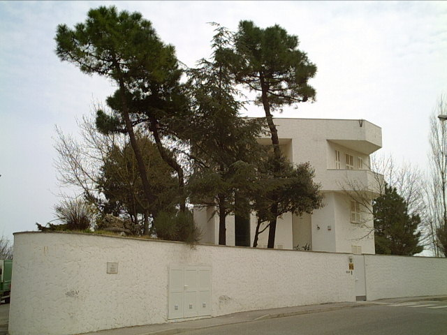 Casa museo Remo Brindisi This is a photo of a monument which is part of cultural heritage of Italy.